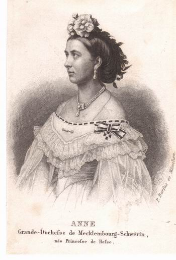 Anna von Mecklenburg-Schwerin, Großherzogin, geb. Prinzessin von Hessen